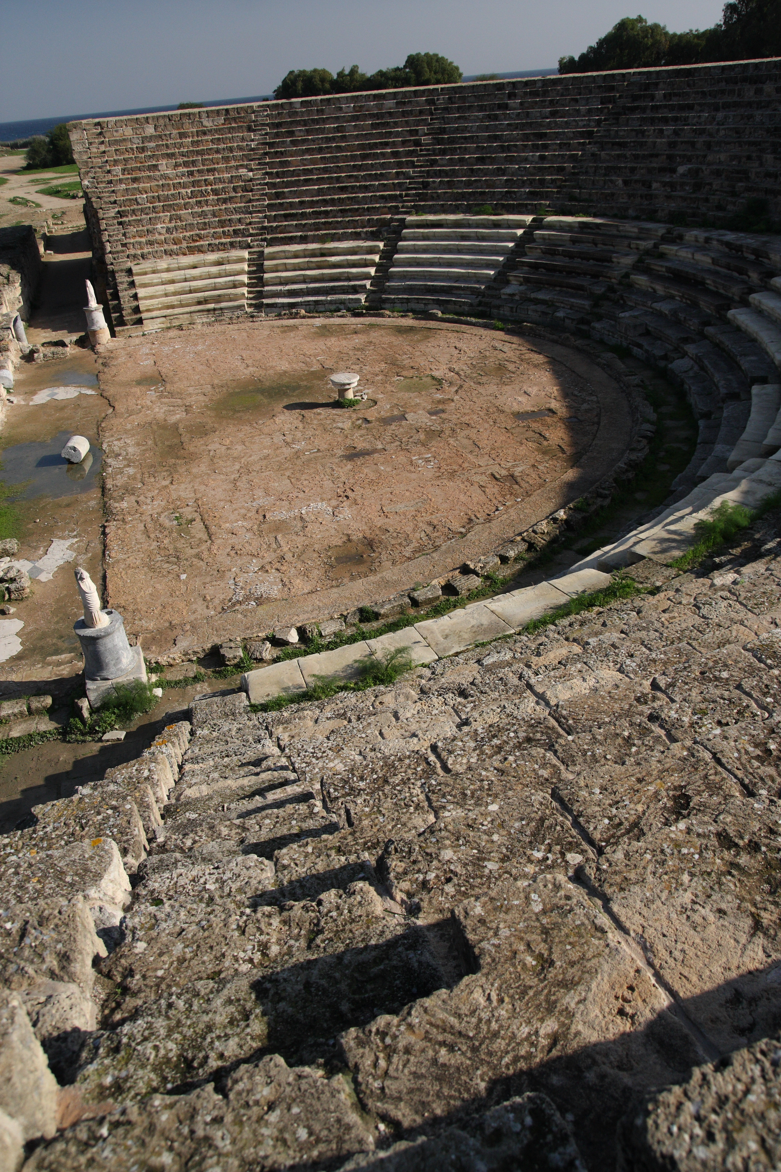 Ancient Salamis, Cyprus